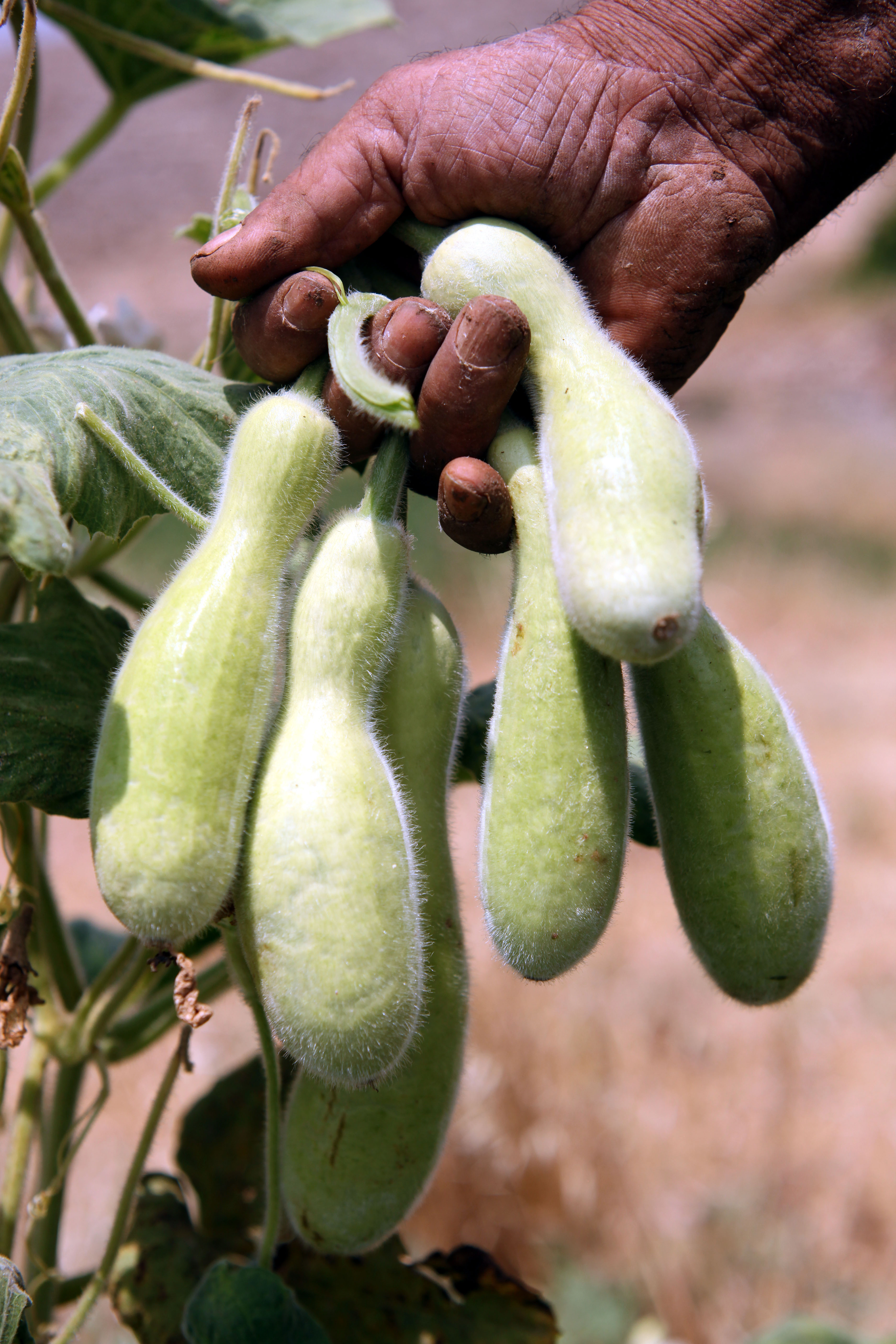 ثمار اليقطين أثناء قطفها، في مدينة الخليل